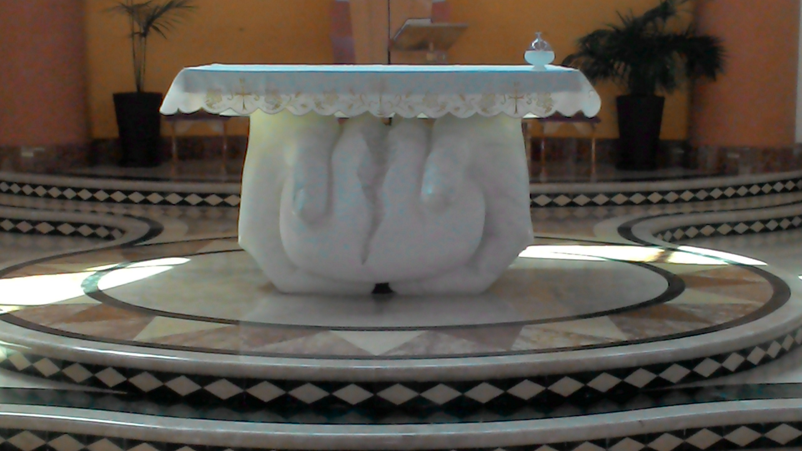 Altare, opera di Massimiliano Apicella